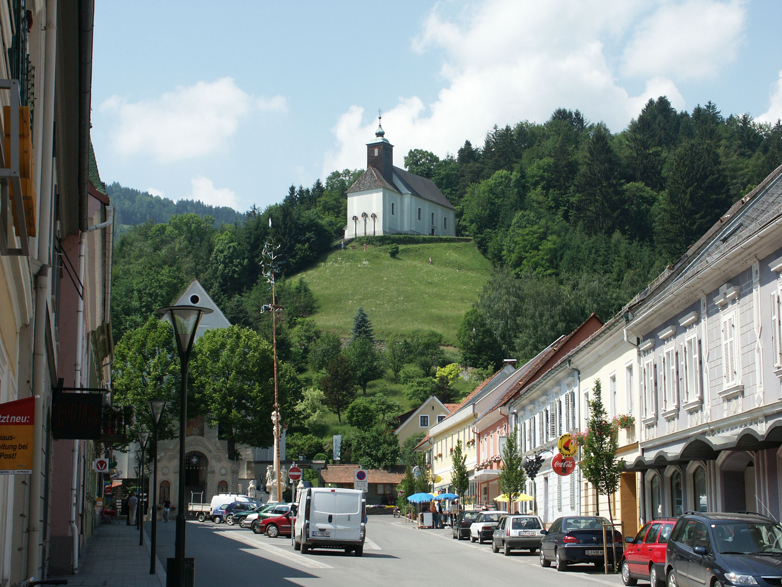 "Außenansicht der Josefikirche in Schwanberg"